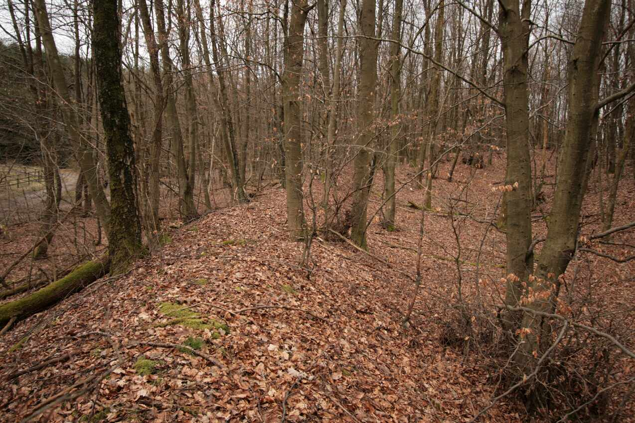 Wallburg Jäckelchen, Hauptwall, rechts Innenseite